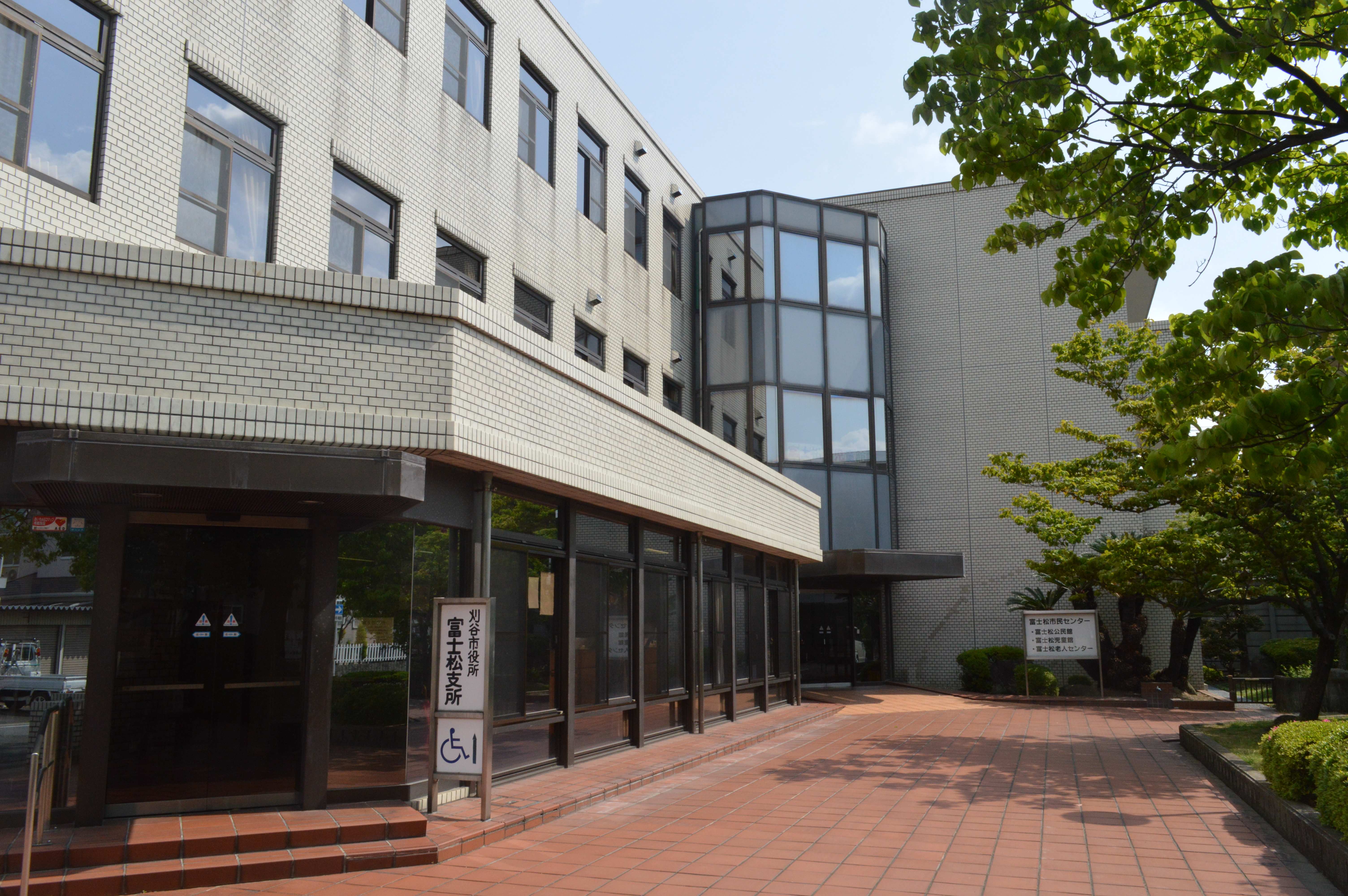 刈谷市富士松市民センター。1階に刈谷市役所富士松支所。2階に富士松公民館、富士松児童館、富士松老人センター、公民館図書室など。